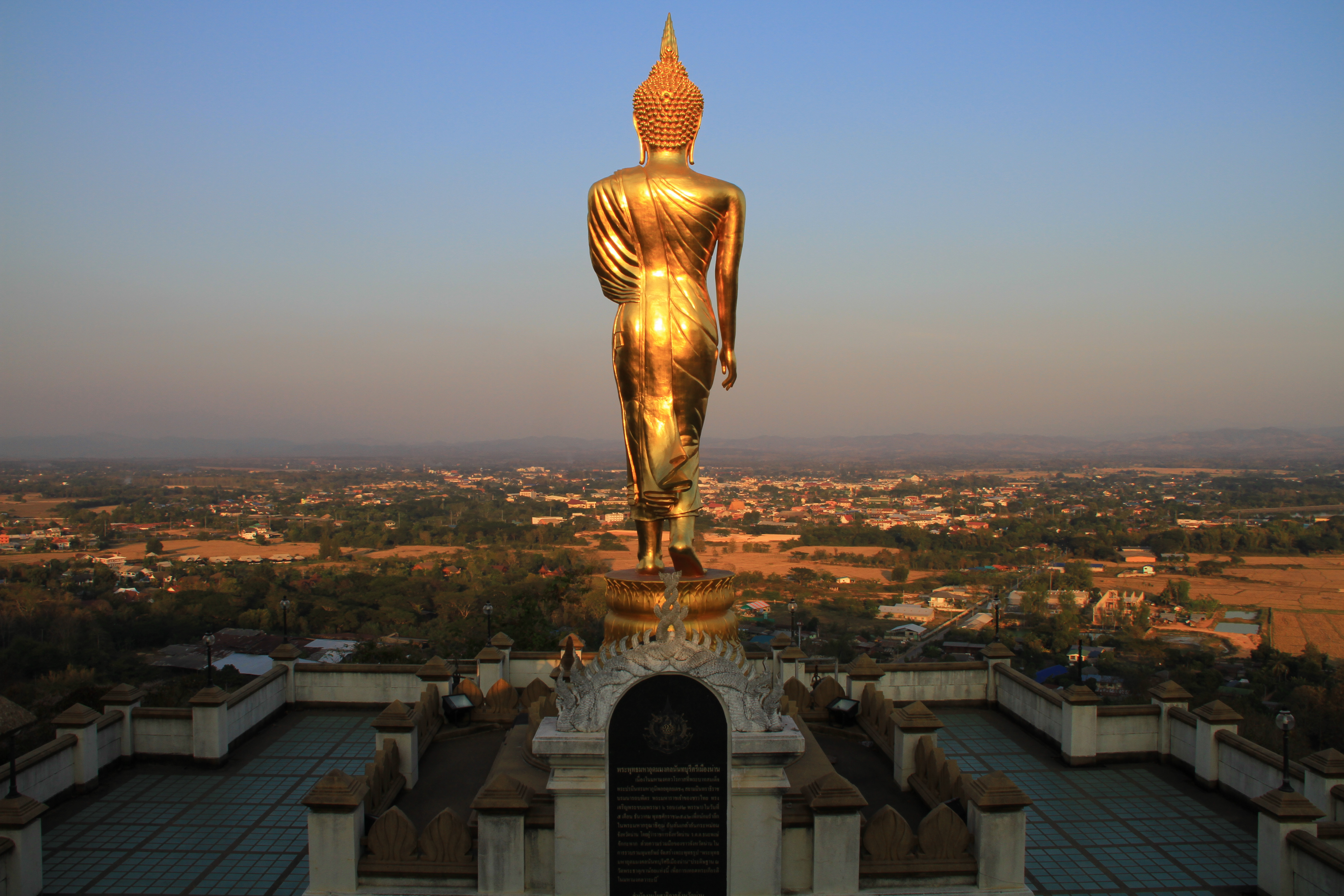 นมัสการพระธาตุเก่าแก่ ชมเมืองน่านจากมุมสูง It is a must place to visit for both cultural heritage and the viewpoint of Nan